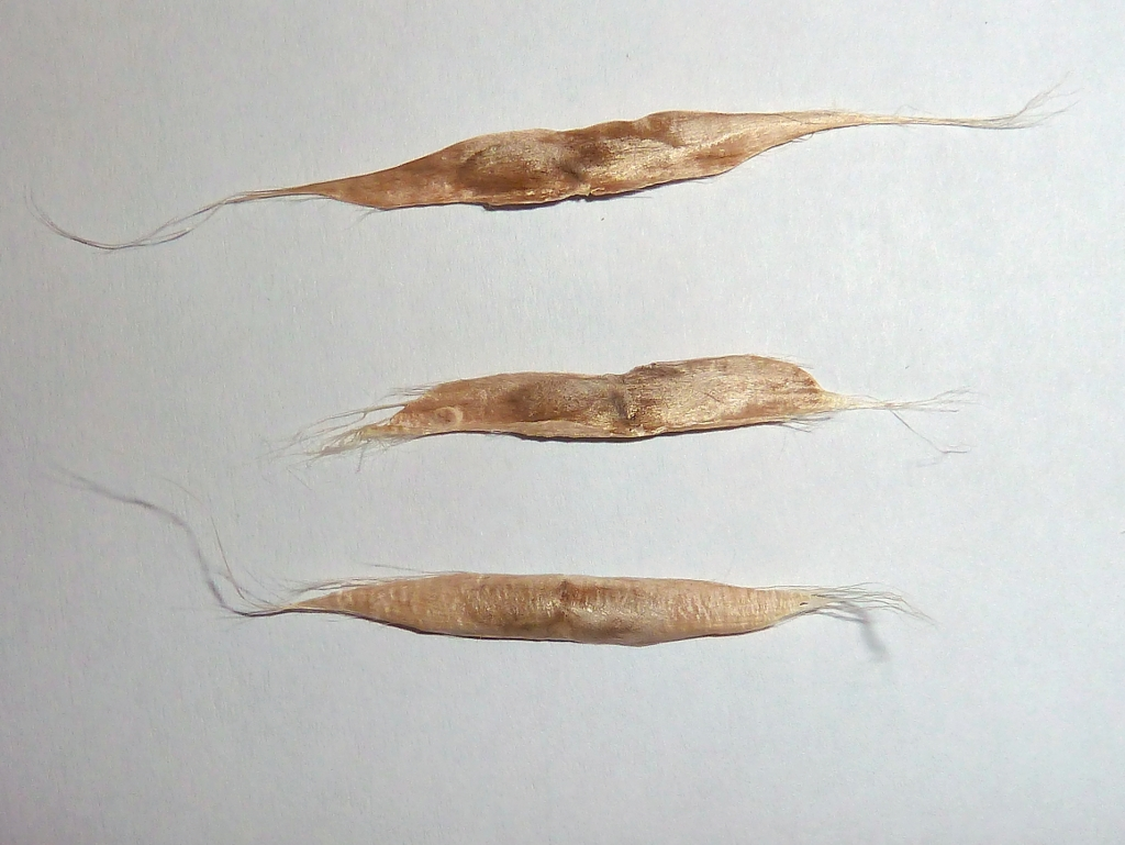 Catalpa bignonioides (Catalpa) : semillas aladas sueltas - Ornamental, calle Virgen de la Alegría (Madrid, España).